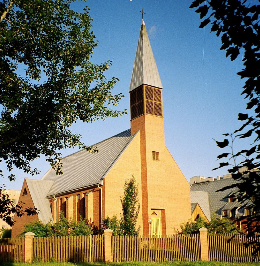 Kirchen und Kulturzentrum Omsk, 2. Preis Moskau 1996. Foto: Schwieger Architekten